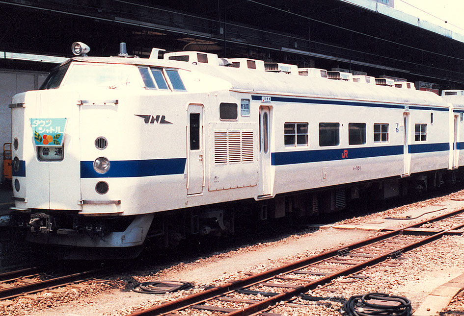 JR九州 クハ715-1 JR九州色